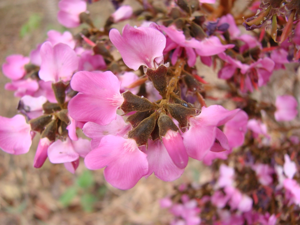 Andira humilis - FABACEAE Jardim Botânico de Brasília - Distrito Federal - Brasil.